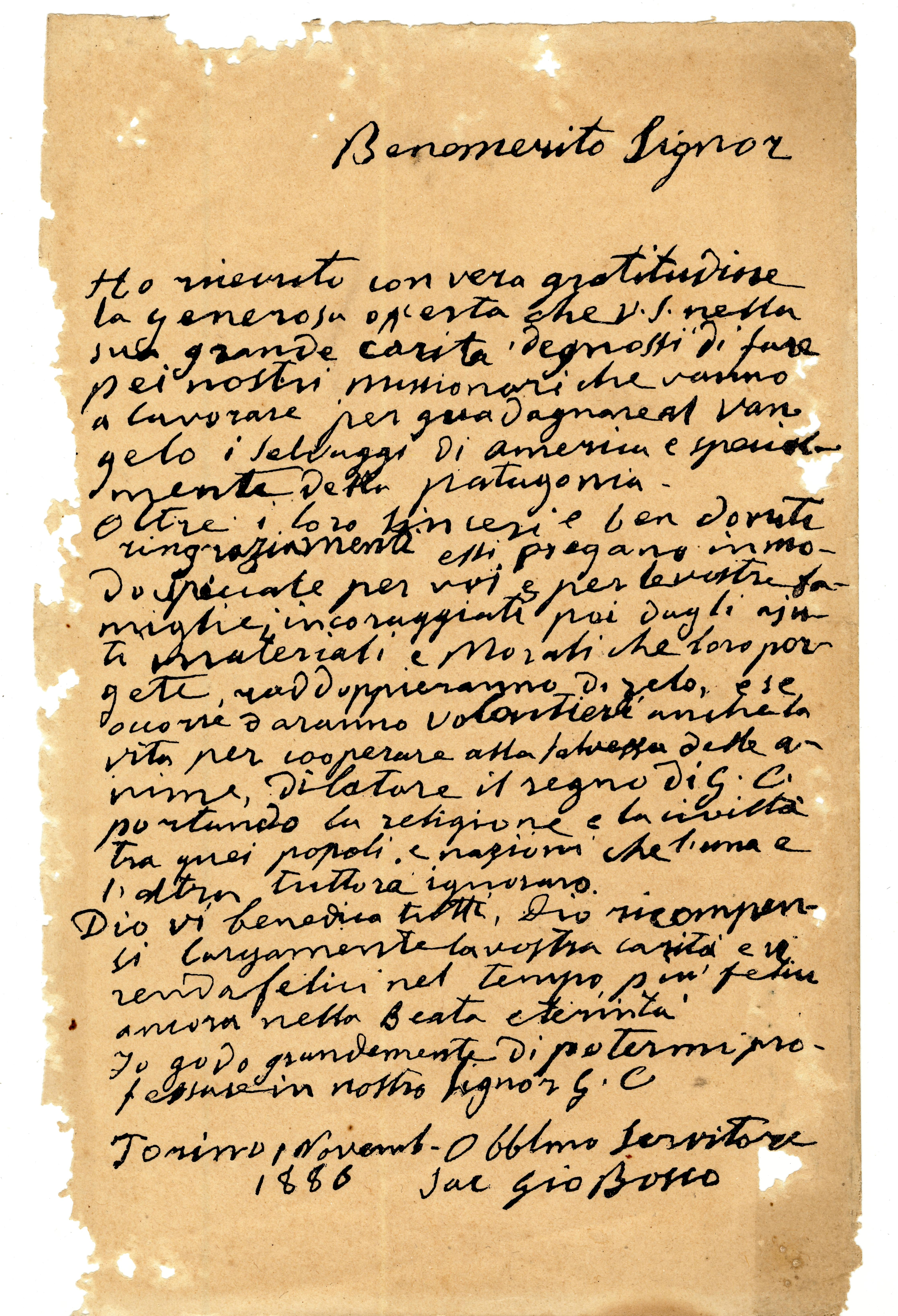 Don Boscov list z roku 1886. List napísal zakladateľ rehole saleziánov Ján Bosco. Venoval ju istému dobrodincovi zo Slovenska.